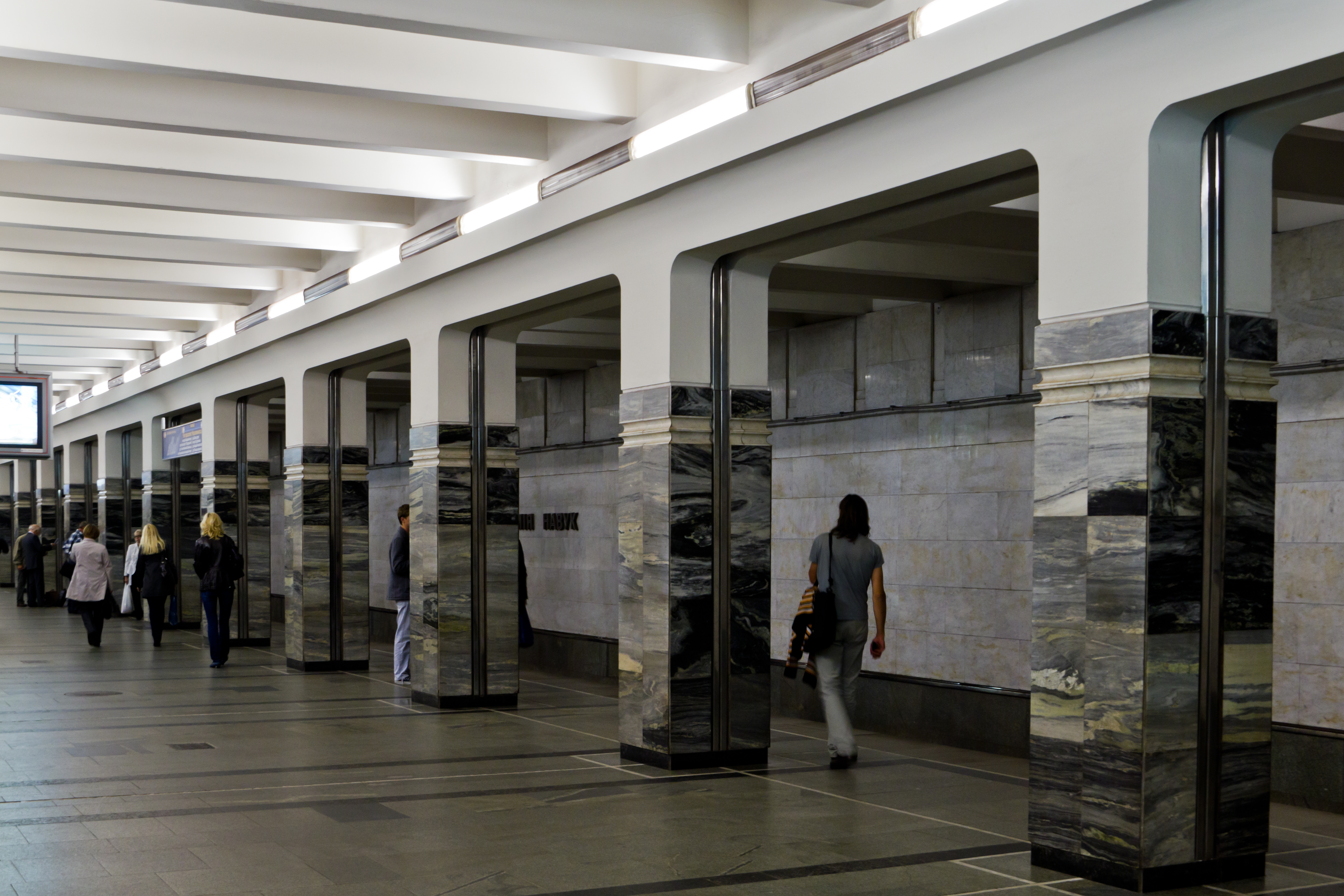 Станция метро «Академия наук», Минск